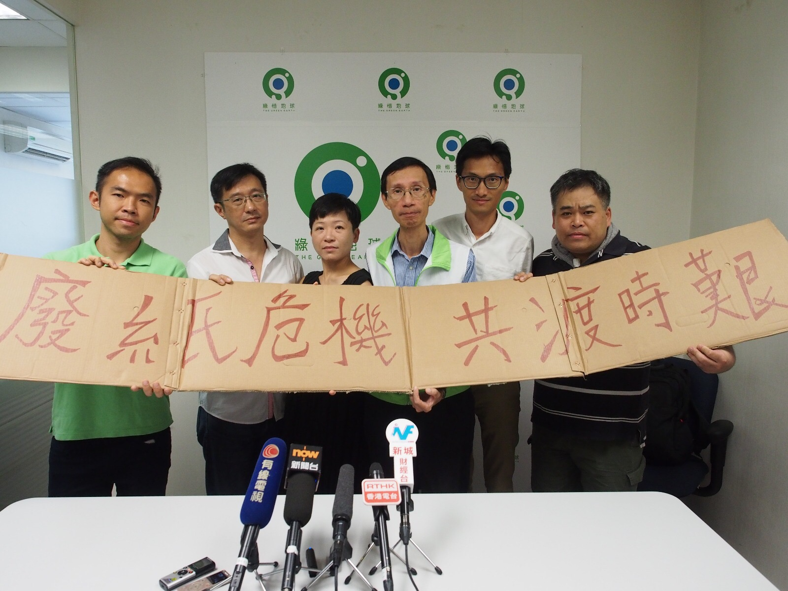 2017年9月香港停收廢紙時，黃頴灝出動向拾荒者回收紙皮。